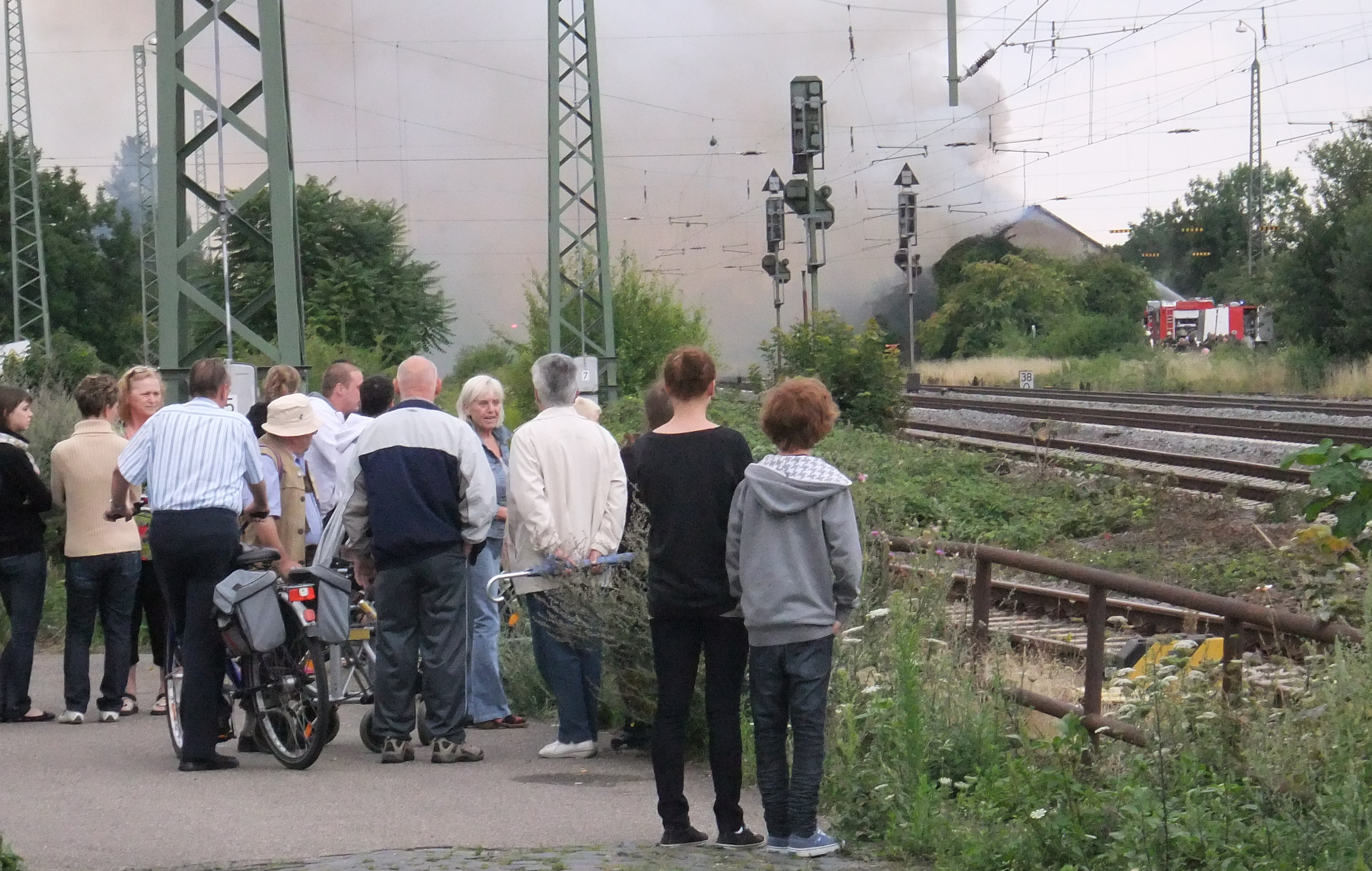 Schaulustige beobachten das Niederbrennen der alten Raiffeisen-Halle an der Bahnstrecke Mainz–Ludwigshafen in Osthofen